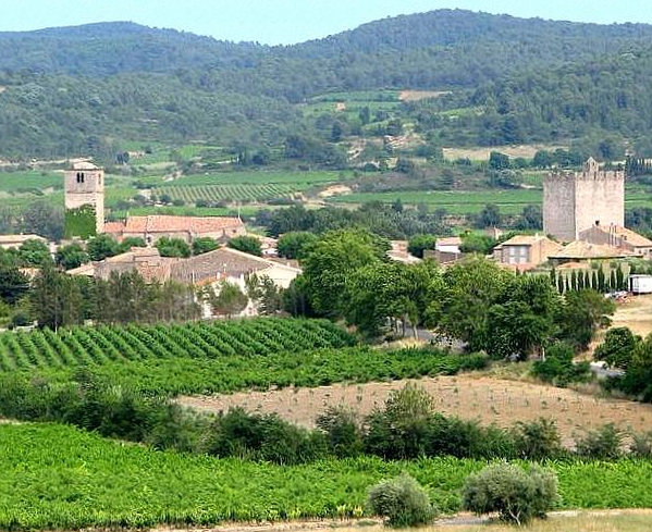 Image de la Ville de Fabrezan prise de la pinède...